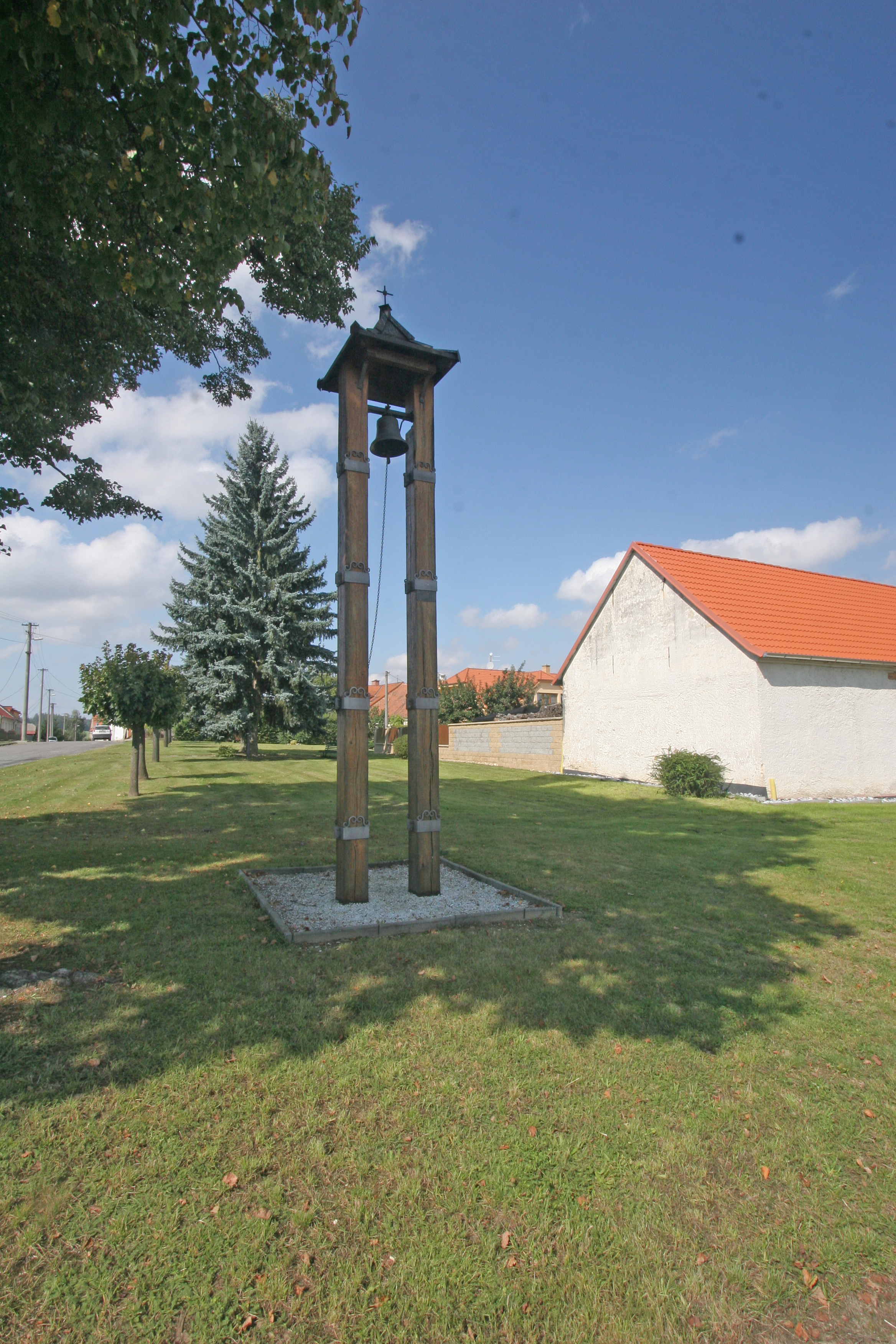 Zálesí zvonička